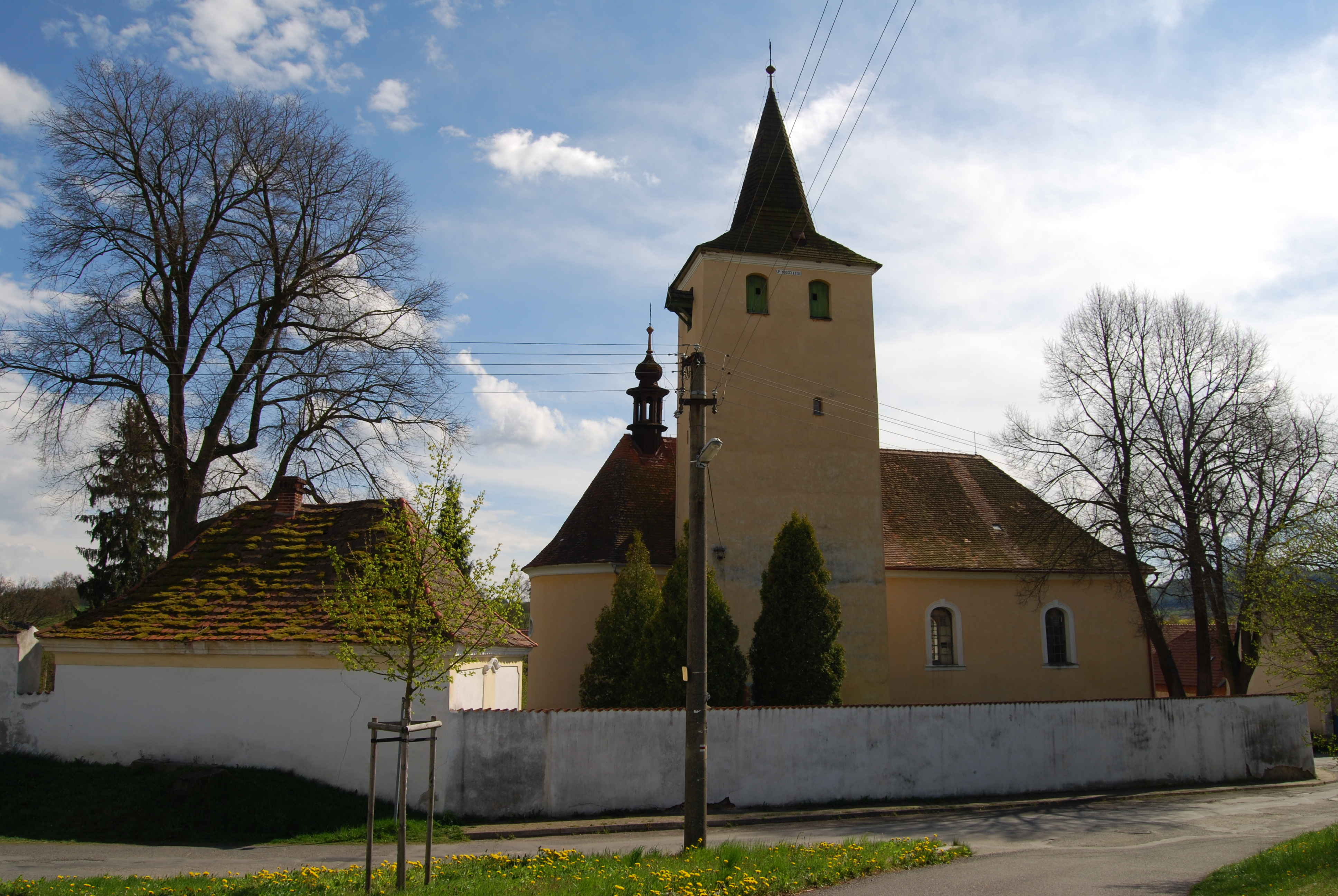 Kostel Nejsvětější Trojice. Jesenice (okres Příbram). Česká republika. - Google Maps - Google Earth